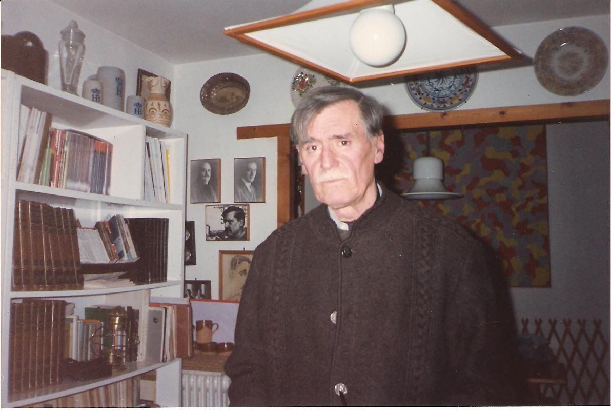 Jose Antonio Garcia-Blanco en Madrid alrededor de 1995